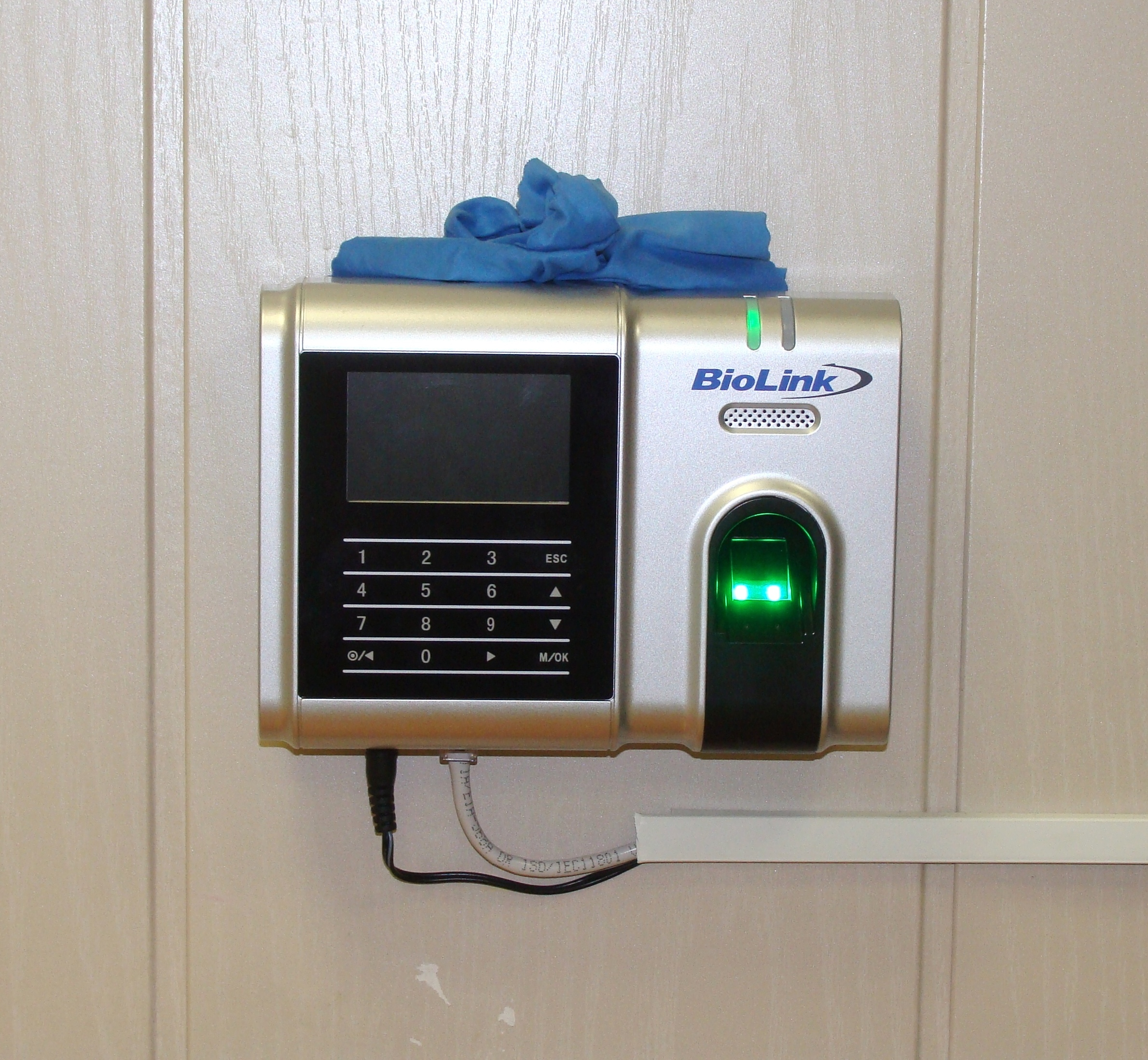 BioLink FingerPass ТМ — биометрический терминал со сканером отпечатков пальцев, предназначенный для учета рабочего времени.